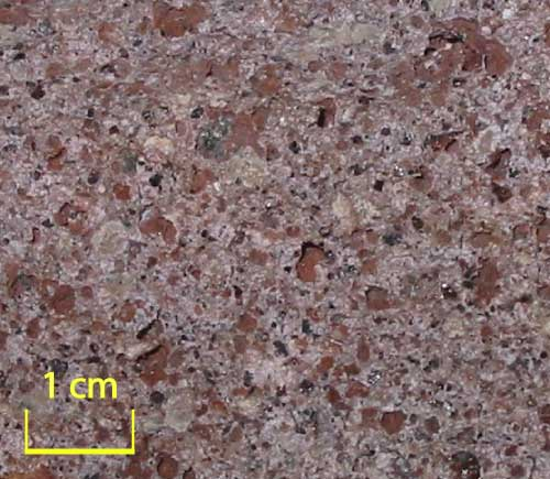 Rüoliit